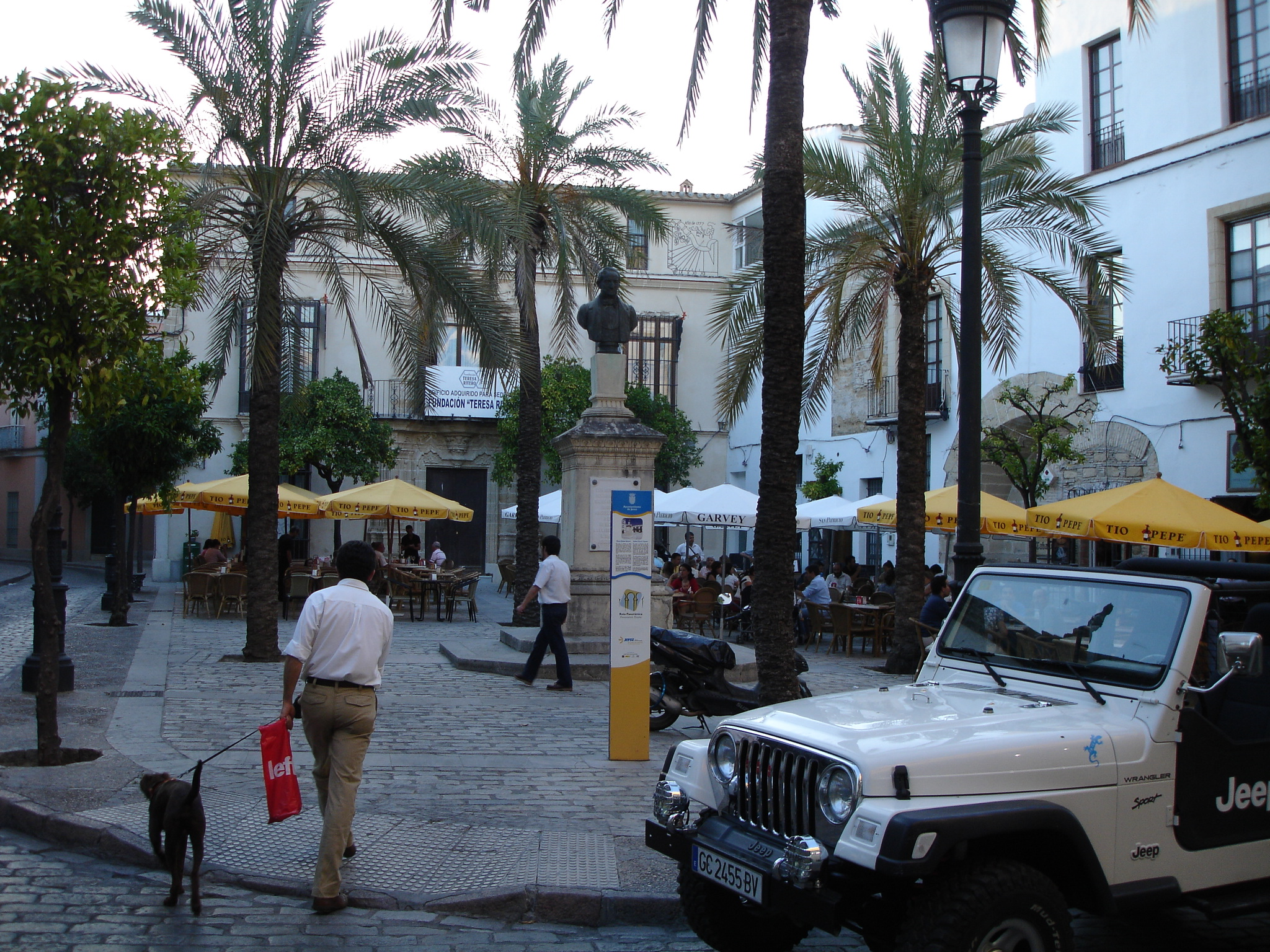 Monumento a Rafael Rivero con el Palacio Luna al fondo. Jerez de la Frontera, Andalusia (Spain)